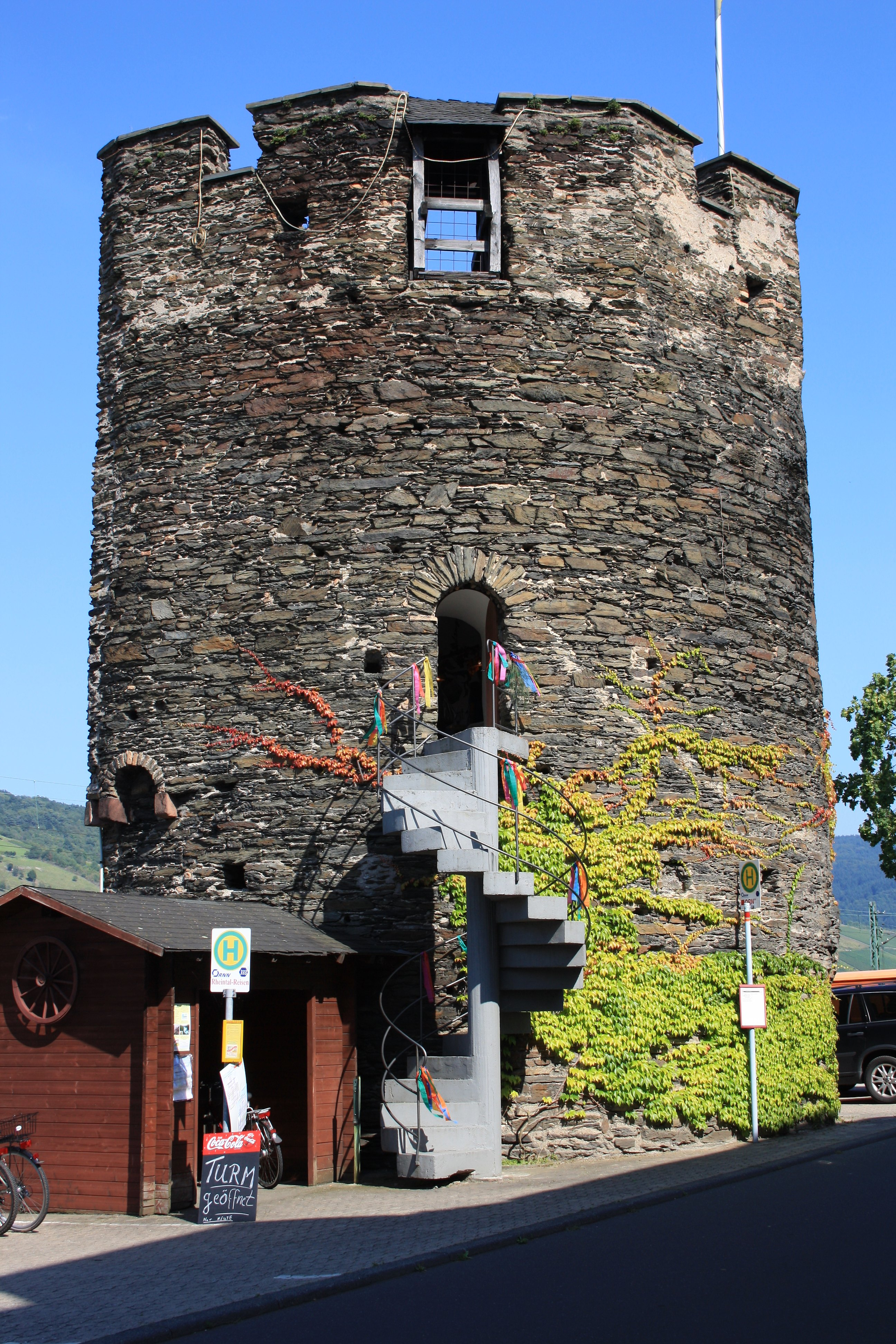 Oberdiebach Zoll-/Wehrturm